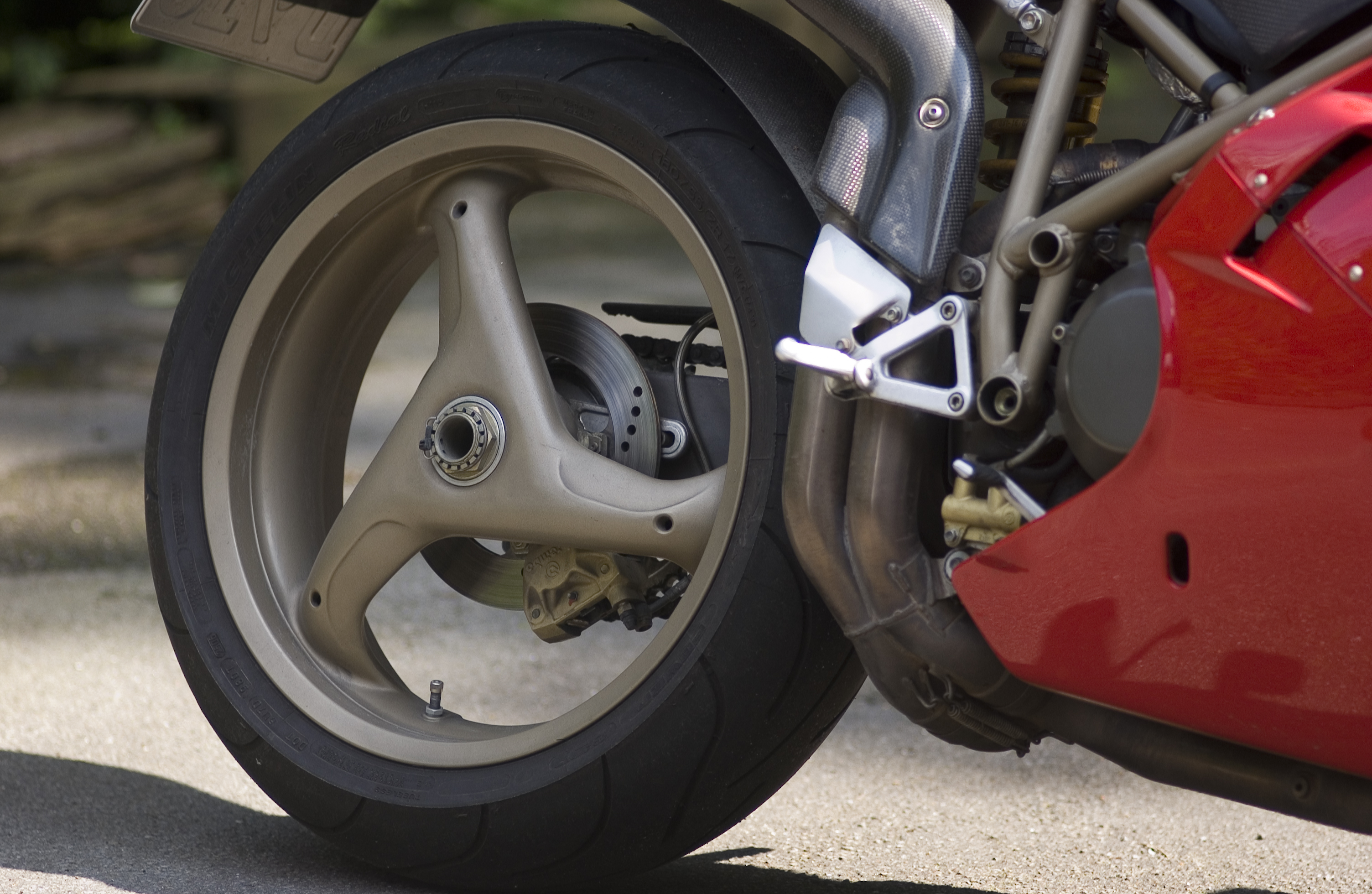 Ducati 916 SPS Hinterrad ScuderiaAssindia